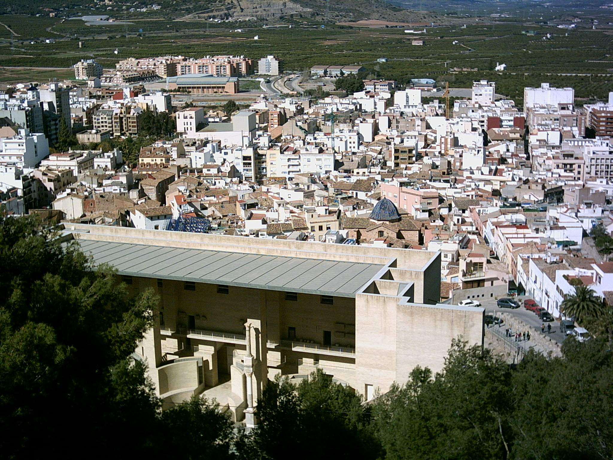 Vista del casco antiguo de Sagunto (España). En primer plano se observa el teatro romano. Foto realizada por Rodriguillo en abril de 2005.